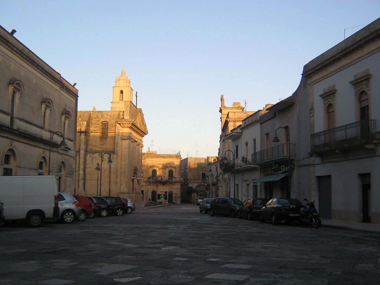 Piazza Pio XII Cursi